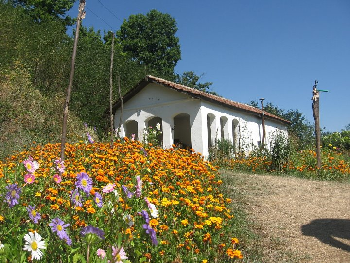 Srpski (latinica): Vetanski manastir, Srbija